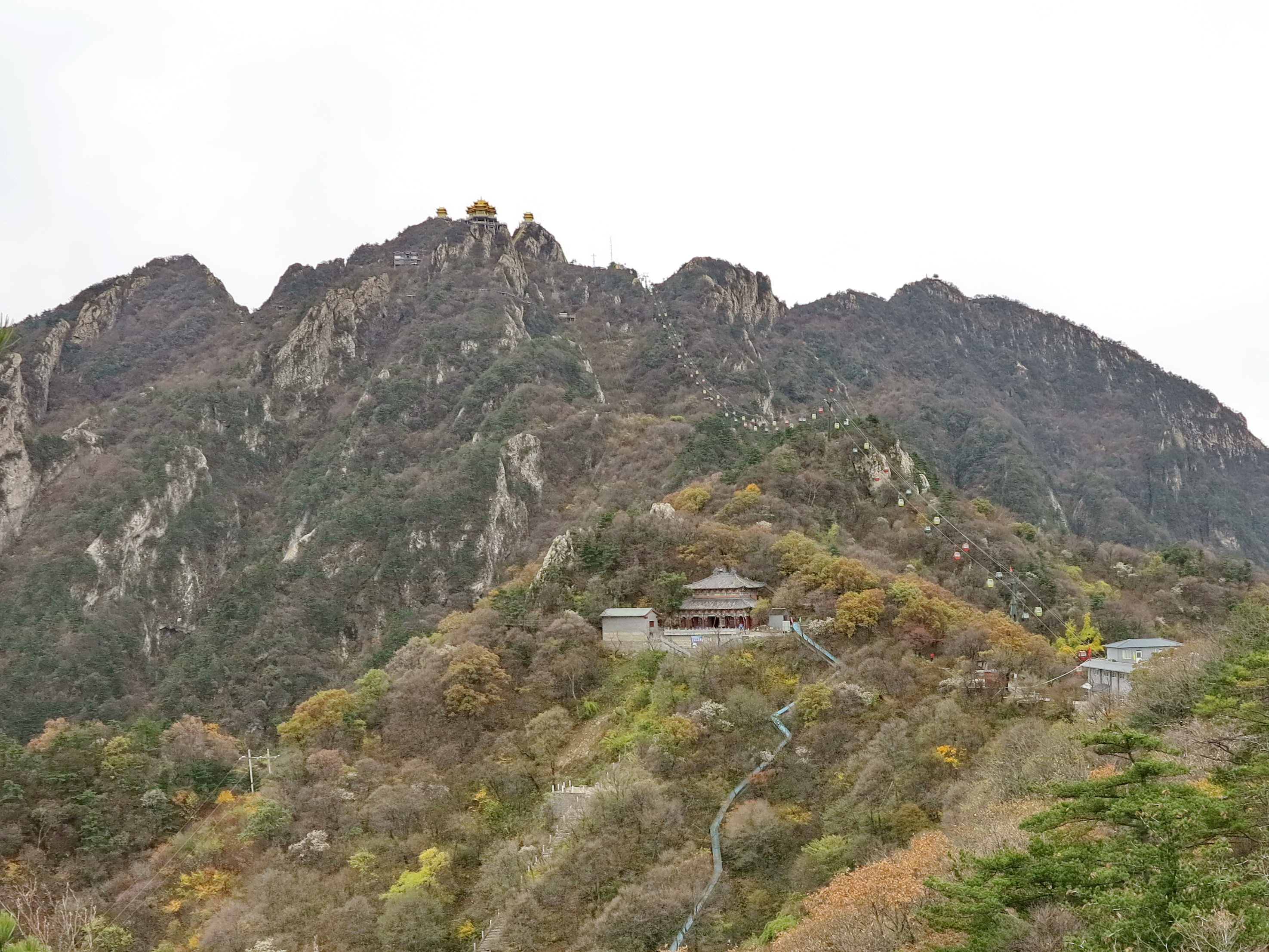 老君山